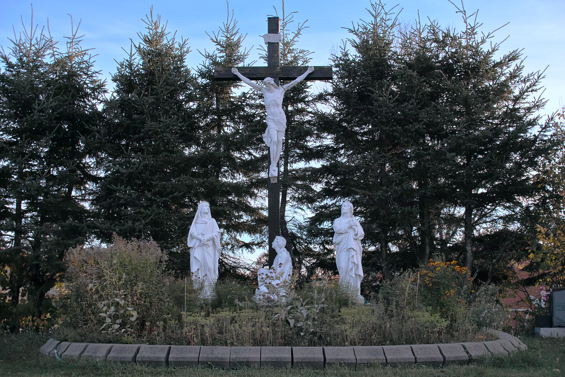 Calvaire du cimetière de Sainte-Brigitte-de-Laval, , Sainte-Brigitte-de-Laval (Canada). (Protection MH cité. Voir la liste des lieux patrimoniaux de la Capitale-Nationale pour plus de détails).